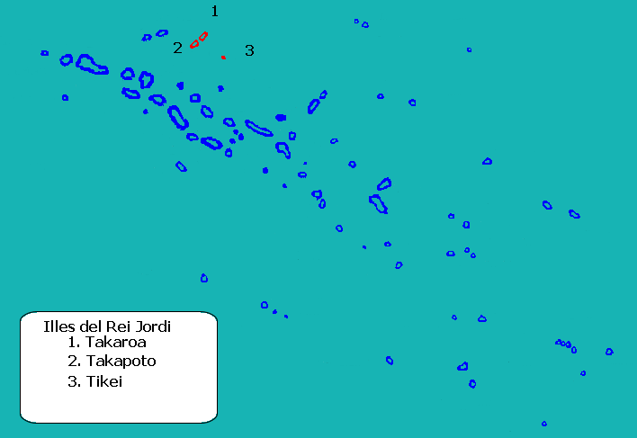 Mapa de localització de la comuna de Takaroa, o illes del Rei Jordi, a l'arxipèlag Tuamotu, Polinèsia Francesa.